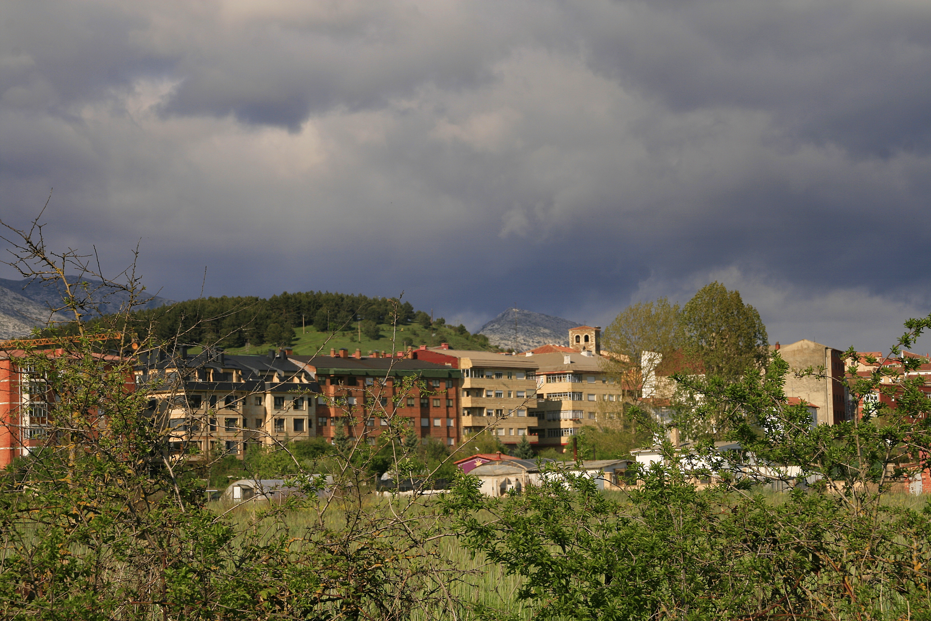 Guardo, Palencia, España.